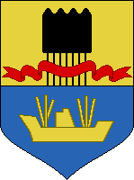 Coat of Arms of Arkhangelsk (Arkhangelsk oblast) (USSR)